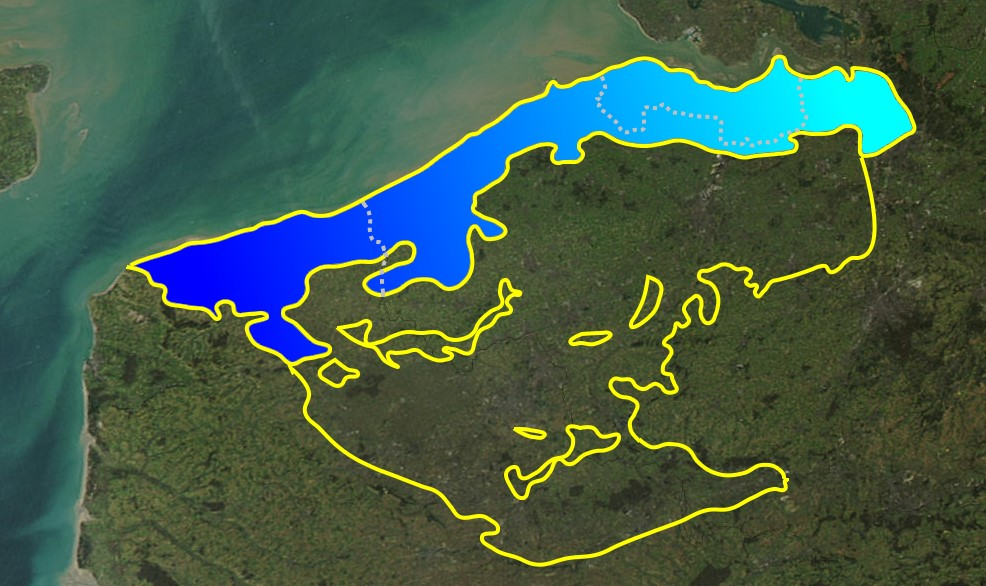 Plaine maritime flamande, Plaine littorale flamande, plaine de Flandre maritime, Flandre maritime, Plaine de l'Escaut